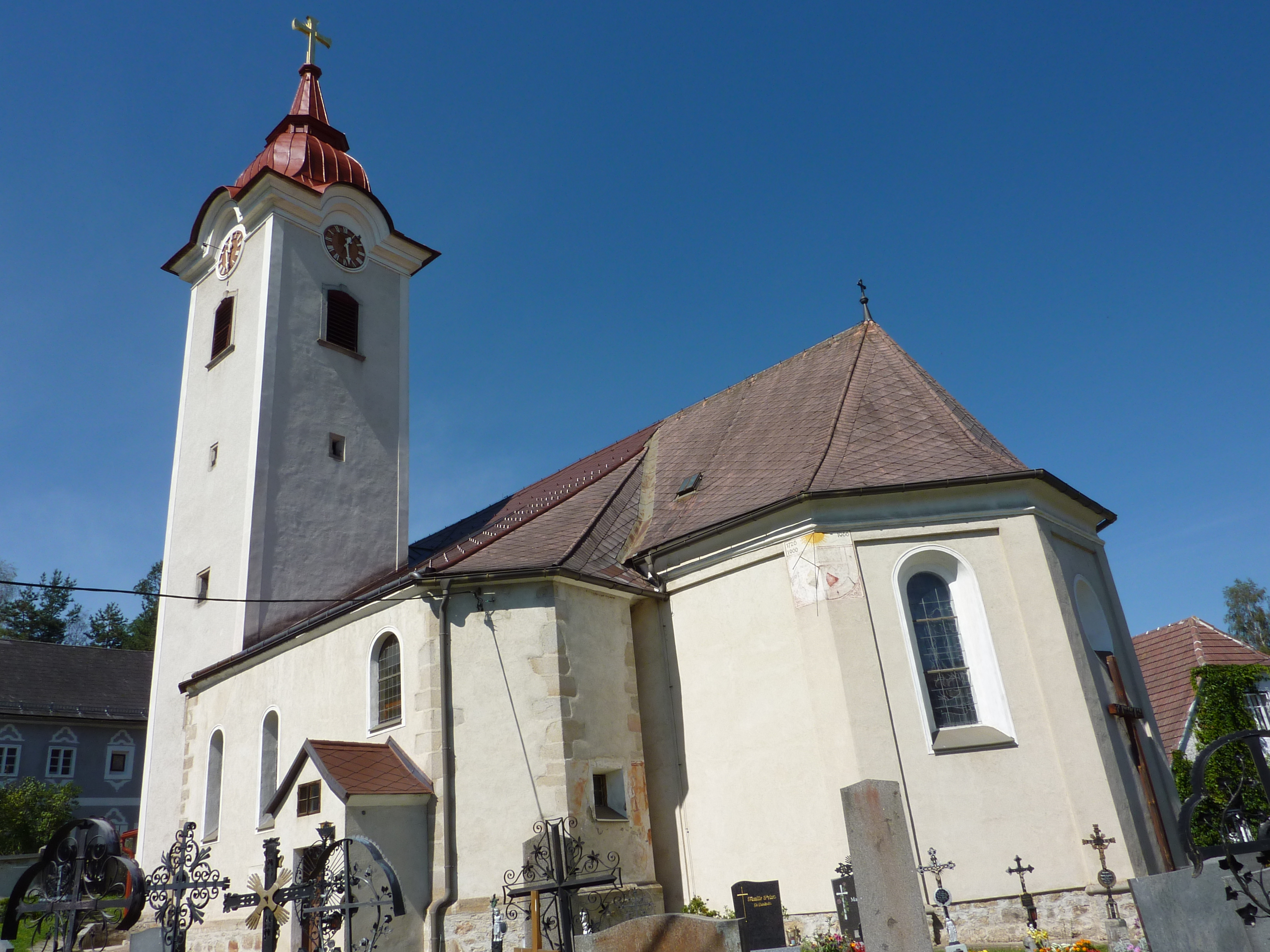 Pfarrkirche, Kirchbach, Rappottenstein, Niederösterreich